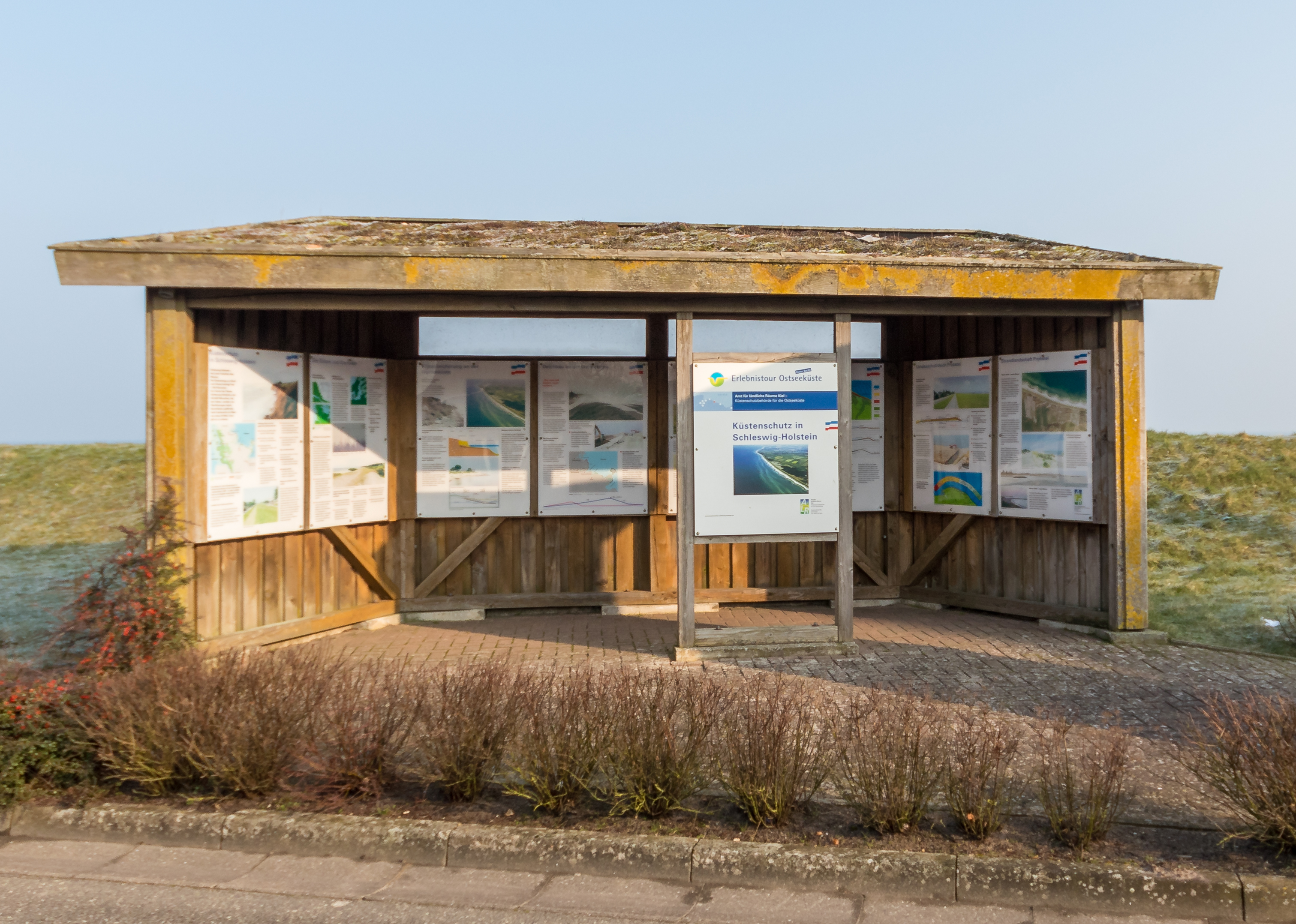 Schönberger Strand – Infopavillion Küstenschutz in Schleswig-Holstein